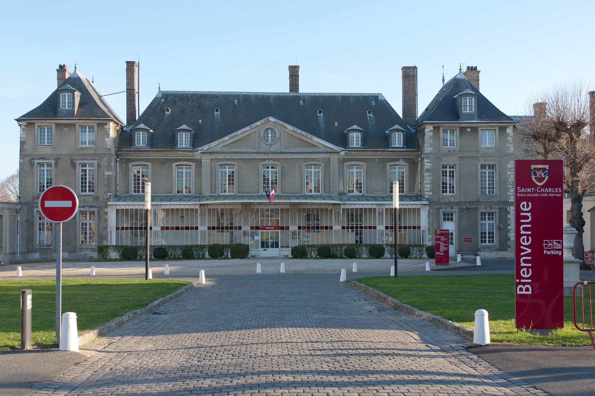 Photo de la façade du château d'Athis-Mons (Essonne, Île-de-France, France).